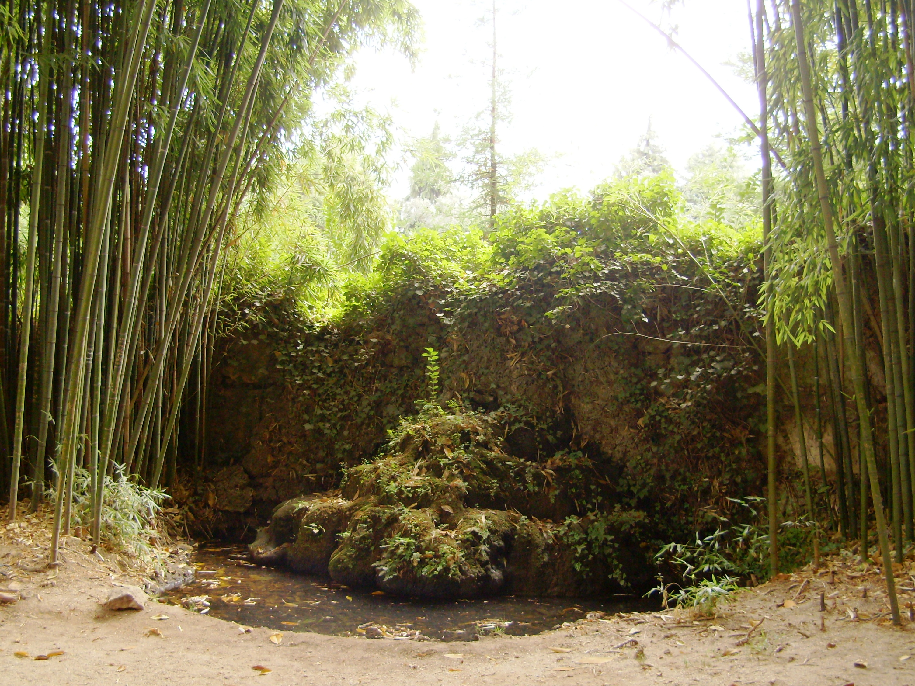 Quinta das Lágrimas, freguesia de Santa Clara, concelho e distrito de Coimbra, Portugal: "Fonte dos Amores".